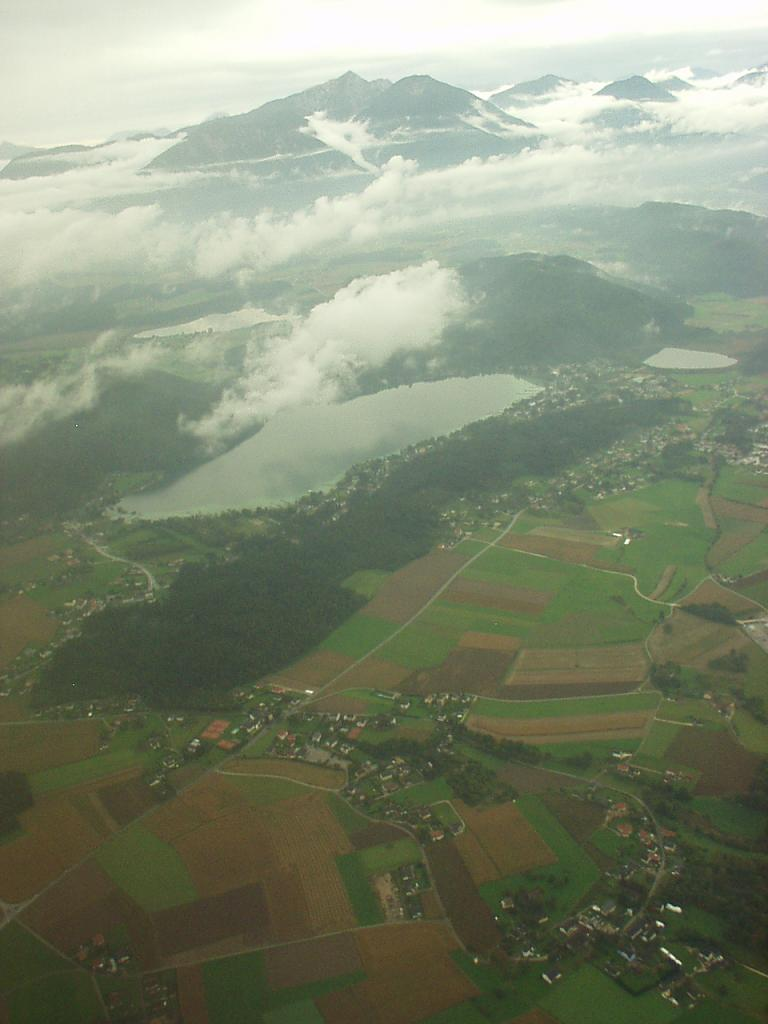 Klopeiner See in AT Kärnten